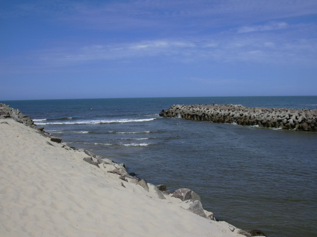 O arroio Chuí encontra o Oceano Atlântico e marca a fronteira entre o Brasil e o Uruguai, no município de Santa Vitória do Palmar, Rio Grande do Sul, Brasil.